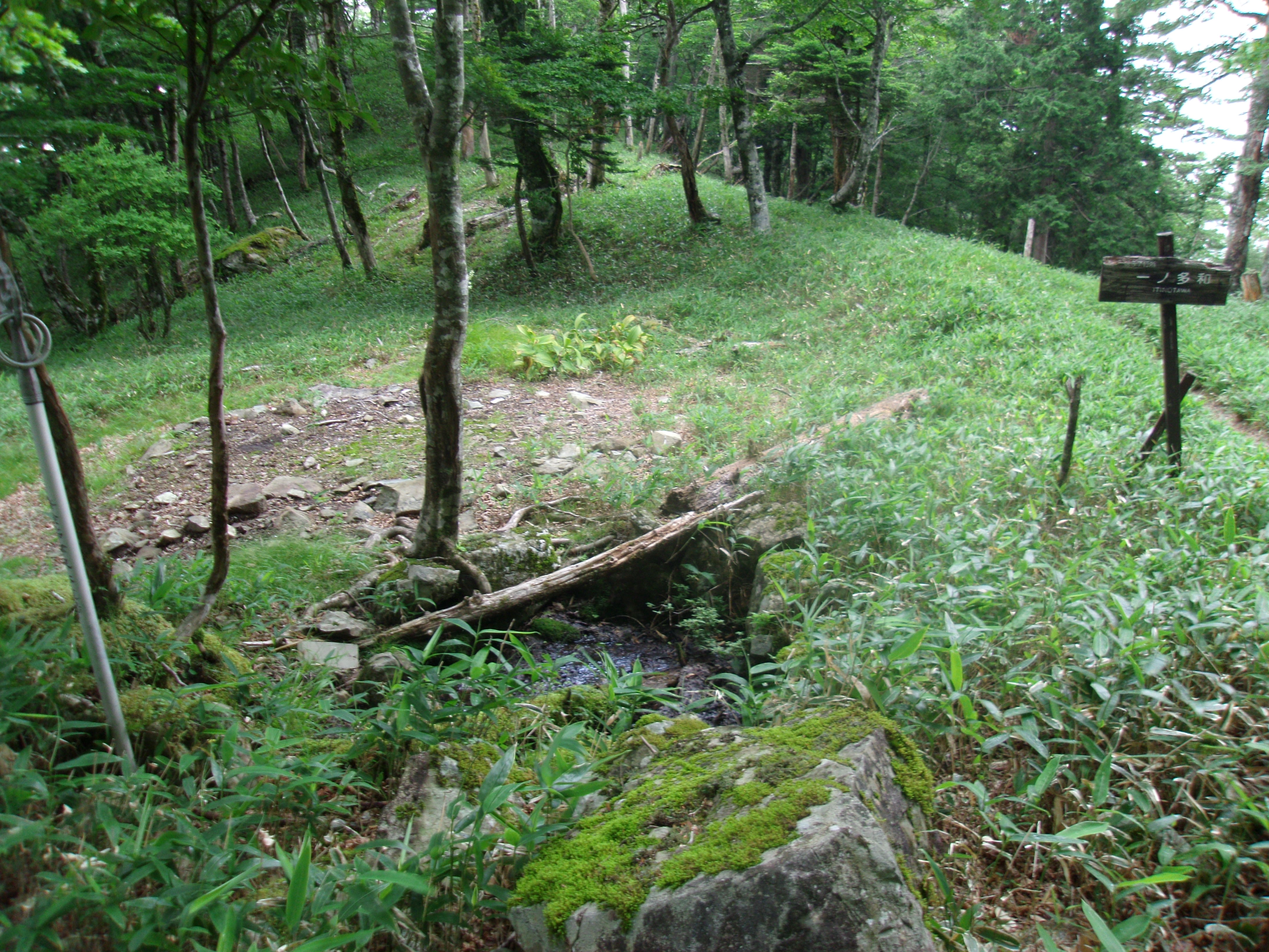 大峯奥駈道第57靡「一ノ多和（一ノ垰）」